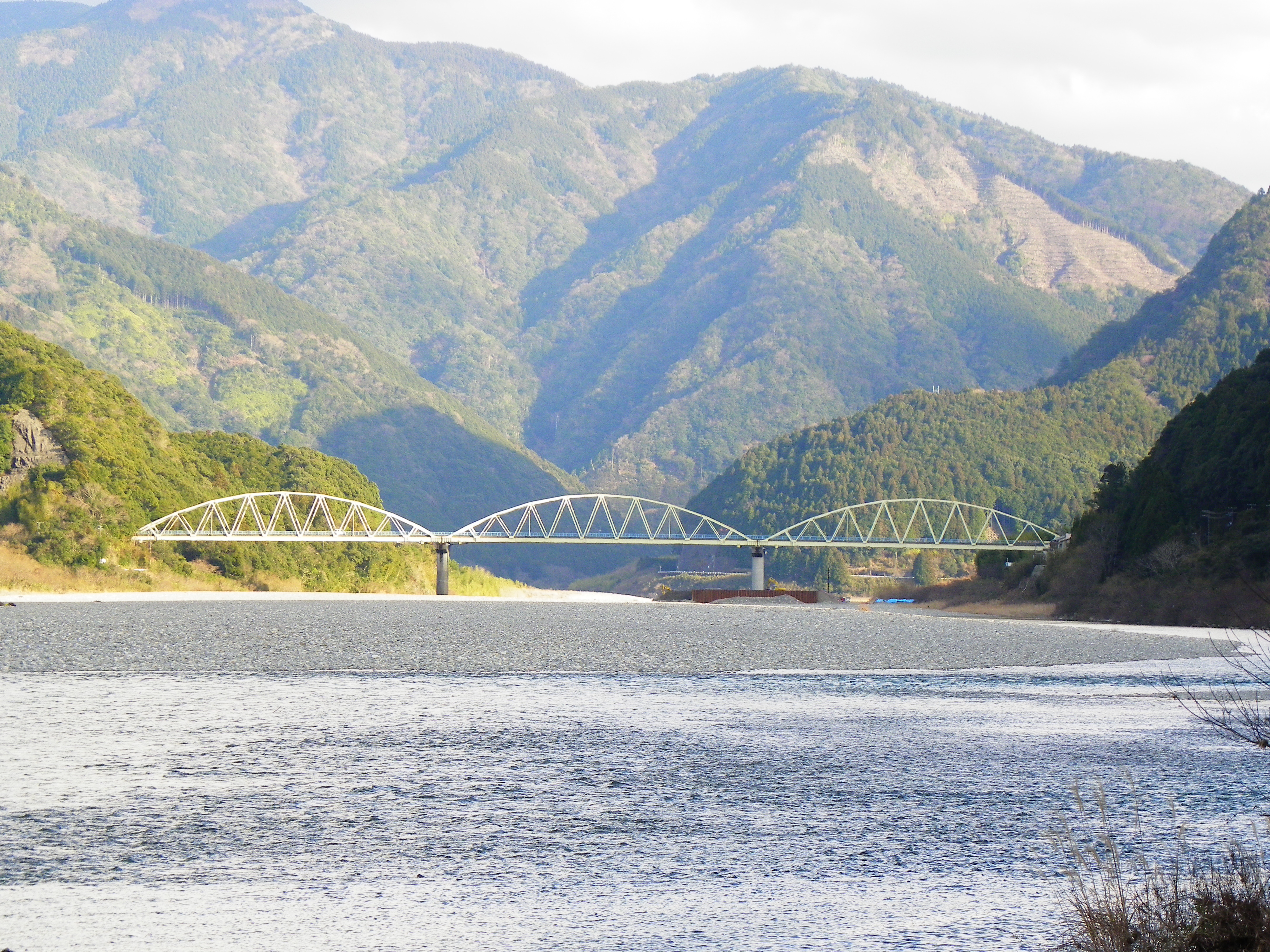 和歌山県新宮市と三重県熊野市の間、熊野川に架かる三和大橋（熊野交通志古乗船場から望む）。